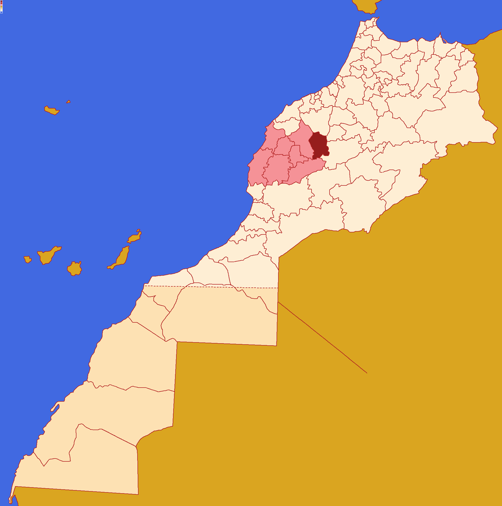 Localização da província de El Kelaa des Sraghna ,dentro da região de Marraquexe-Safim e dentro de Marrocos. Conforme a reforma administrativa de 2015.